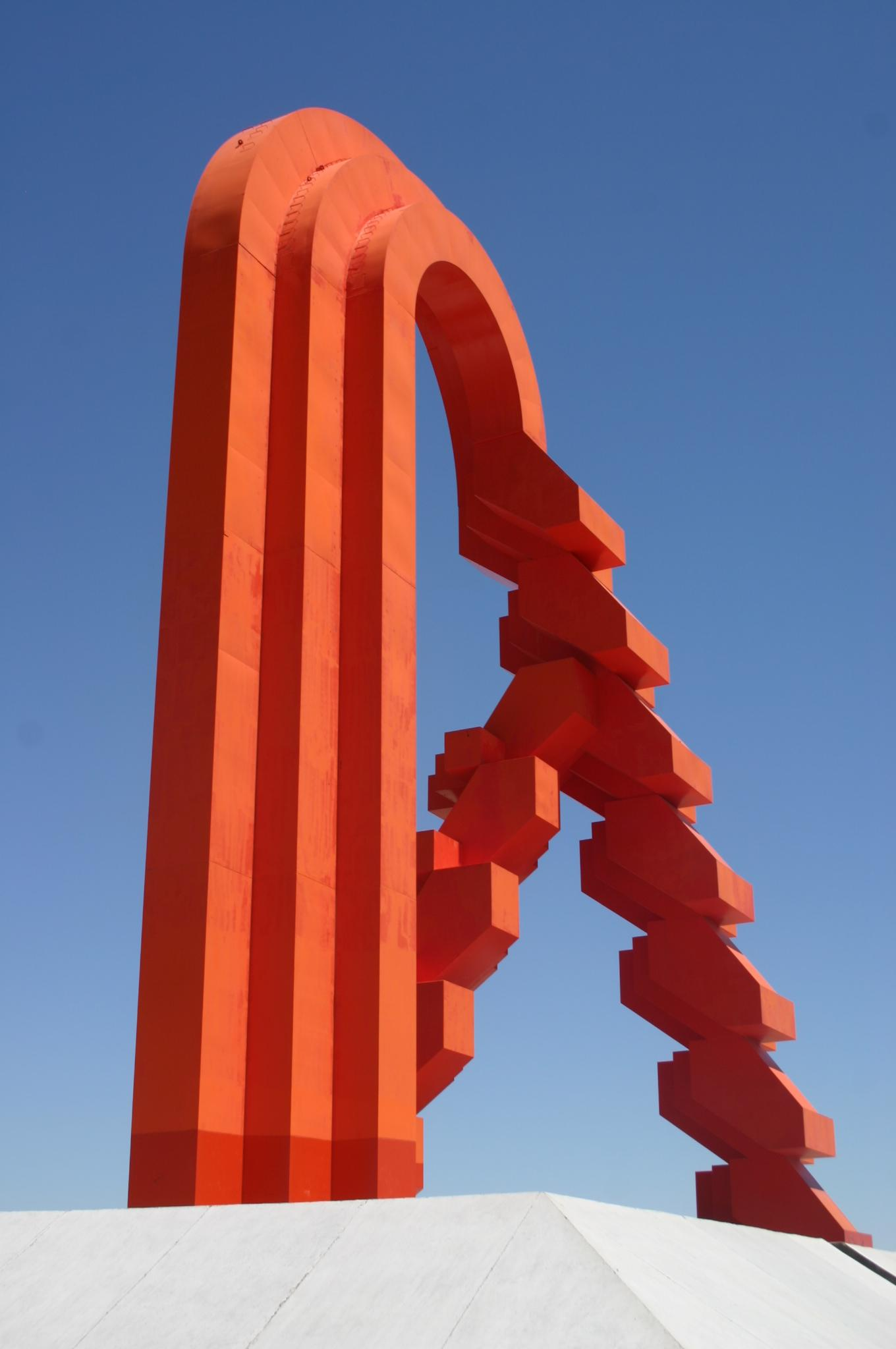 Puerta de Chihuahua a la entrada sur de la Ciudad de Chihuahua, Mexico realizada por el escultor Sebastian